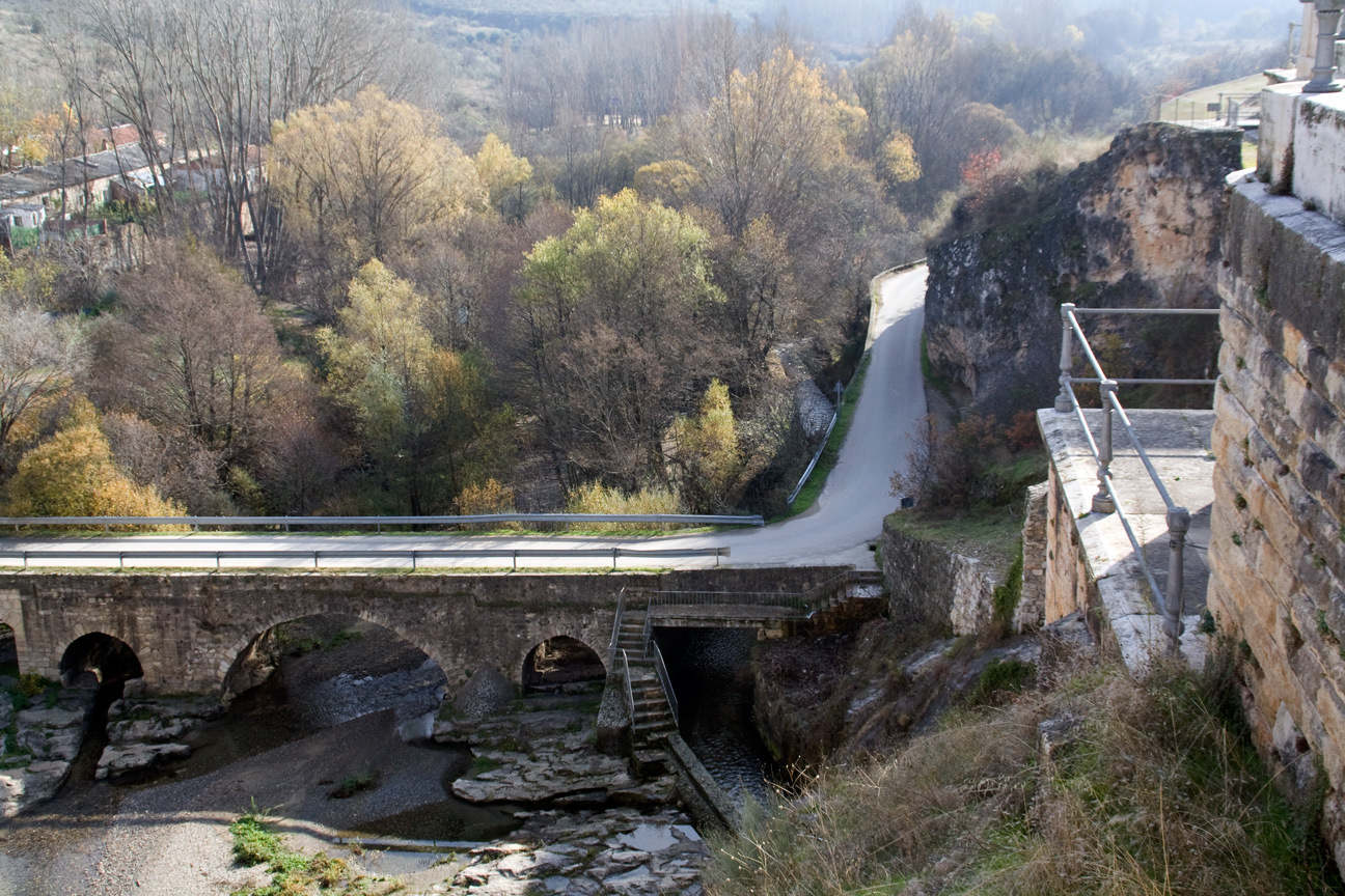 Canal de Cabarrús junto al Pontón de la Oliva